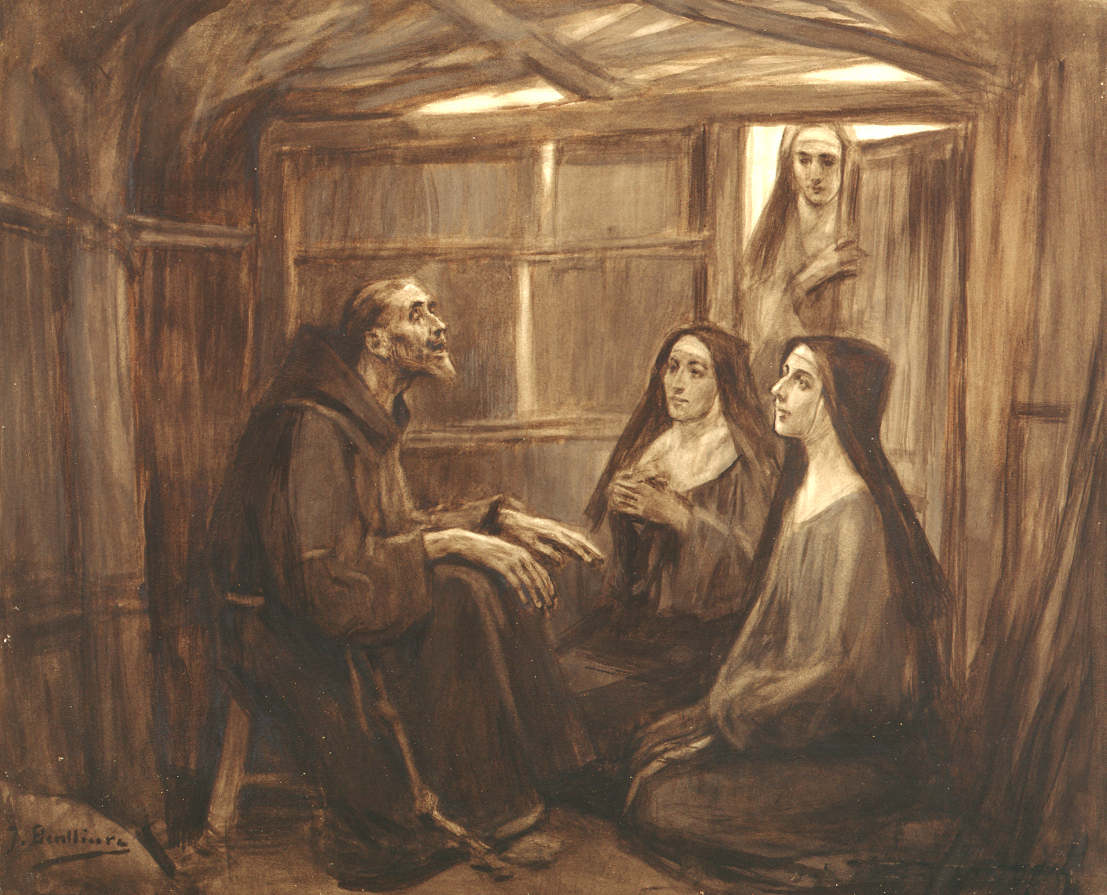 San Francisco, semiciego, conversa con Santa Clara en la chocita de San Damián.